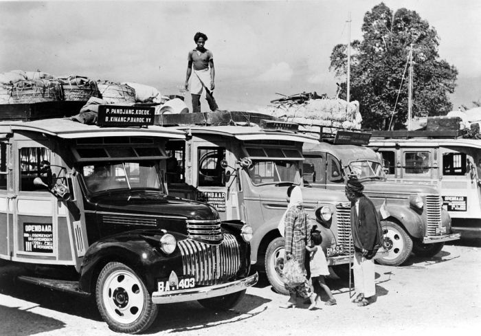 Repronegatief. Autobussen op weg naar de markt in het Lampung district, Sumatra